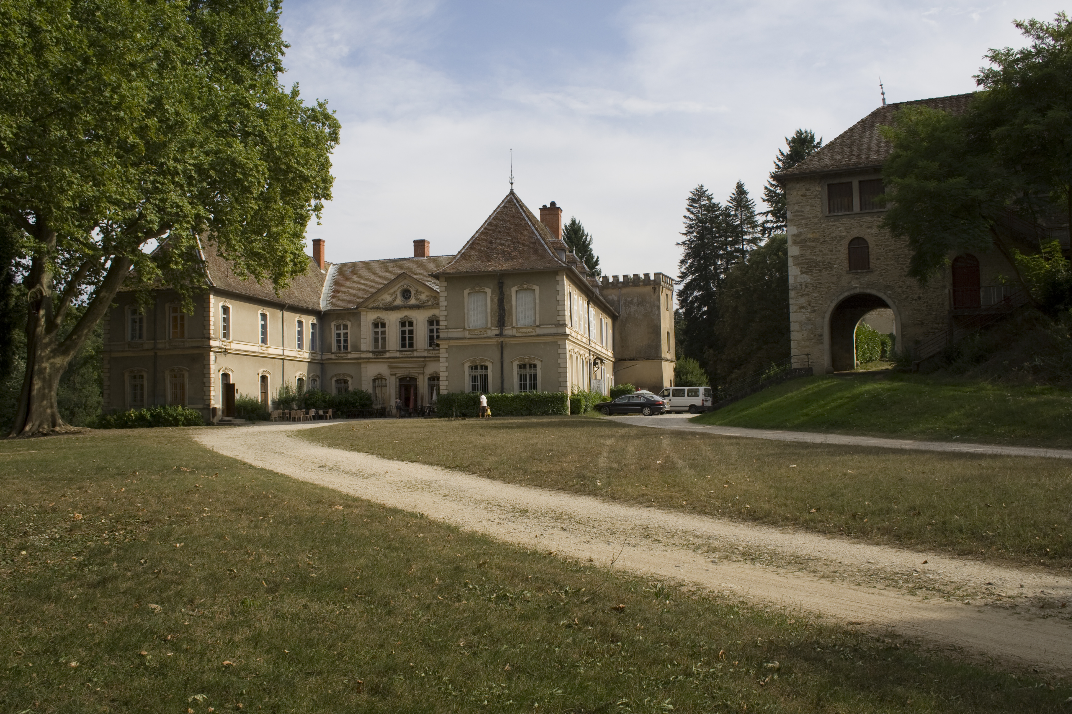 Le château de Passins (38510)